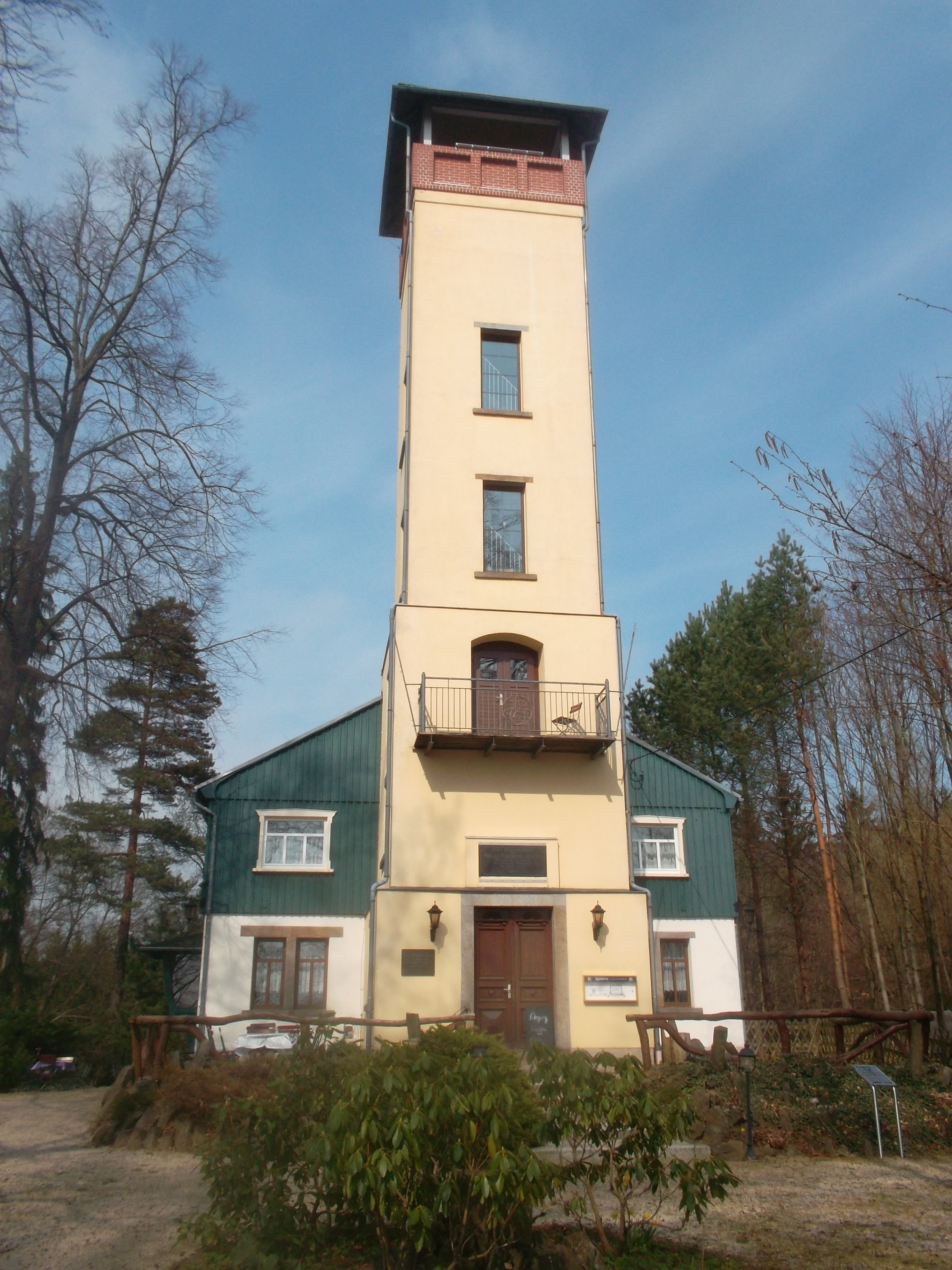 Turm der Prinz-Friedrich-August Baude in Sohland an der Spree